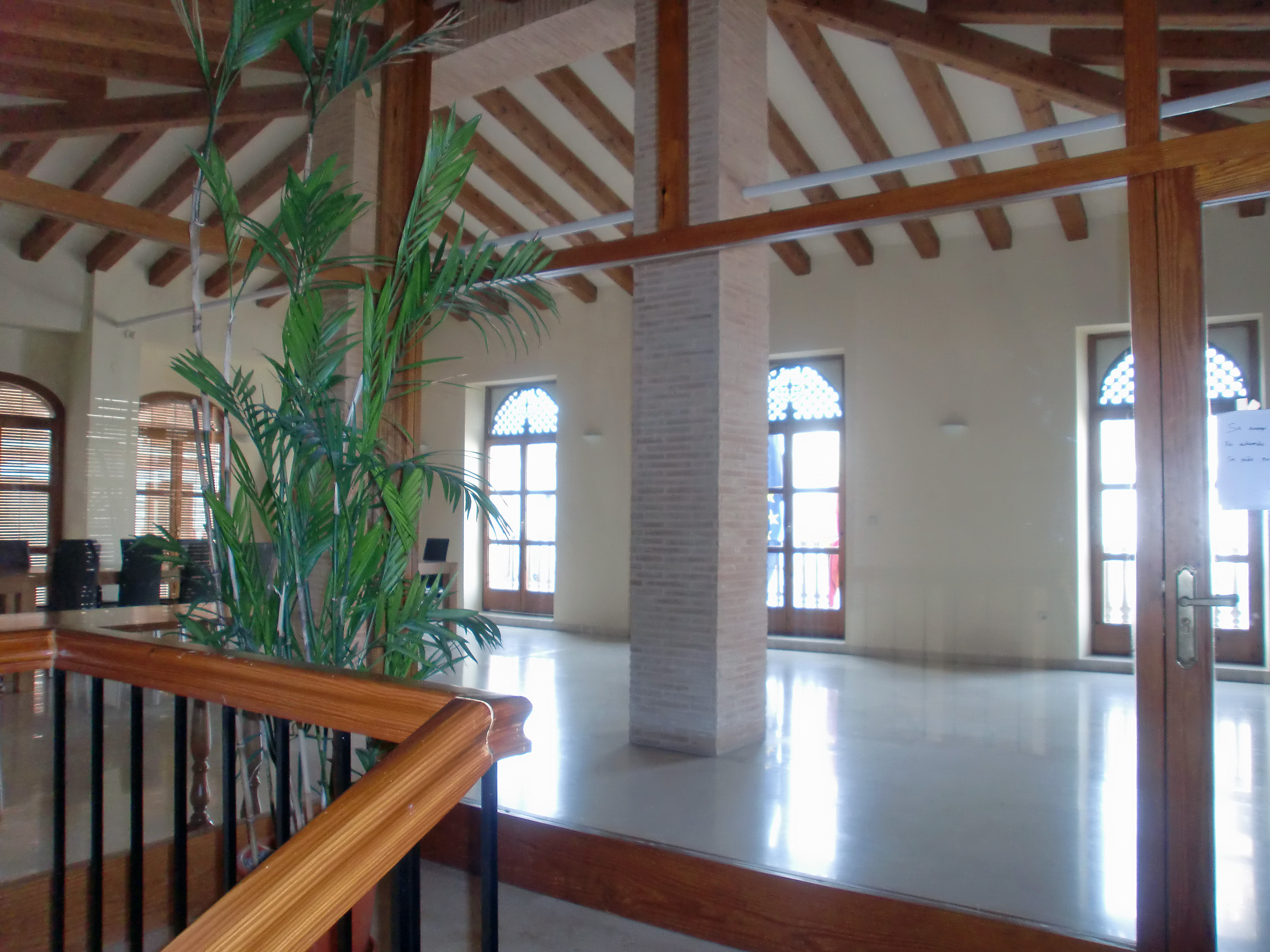 SALA DE PLENARIS DE L'AJUNTAMENT DE SAGRA